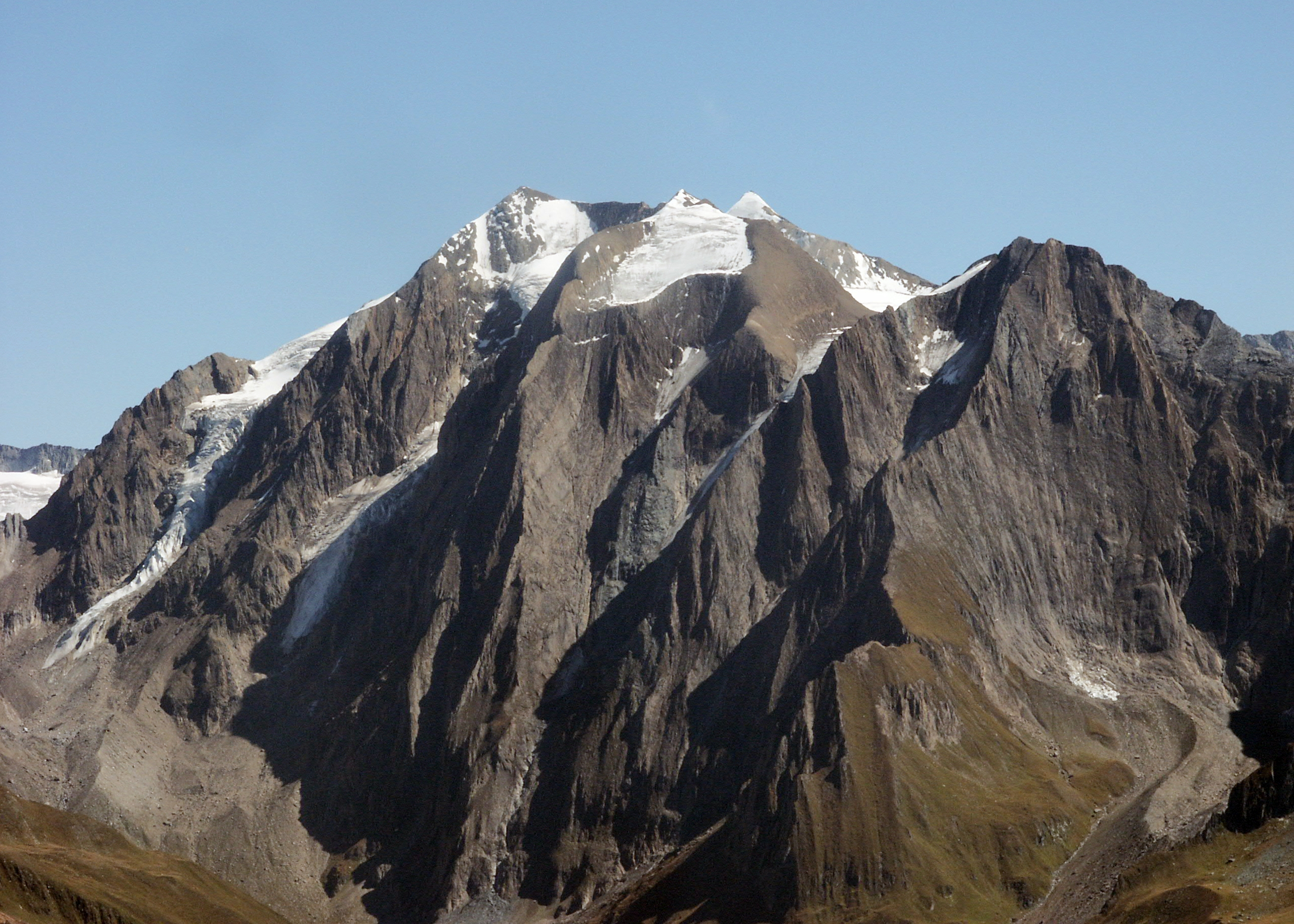 Hochferner, Zillertaler Alpen, Italy